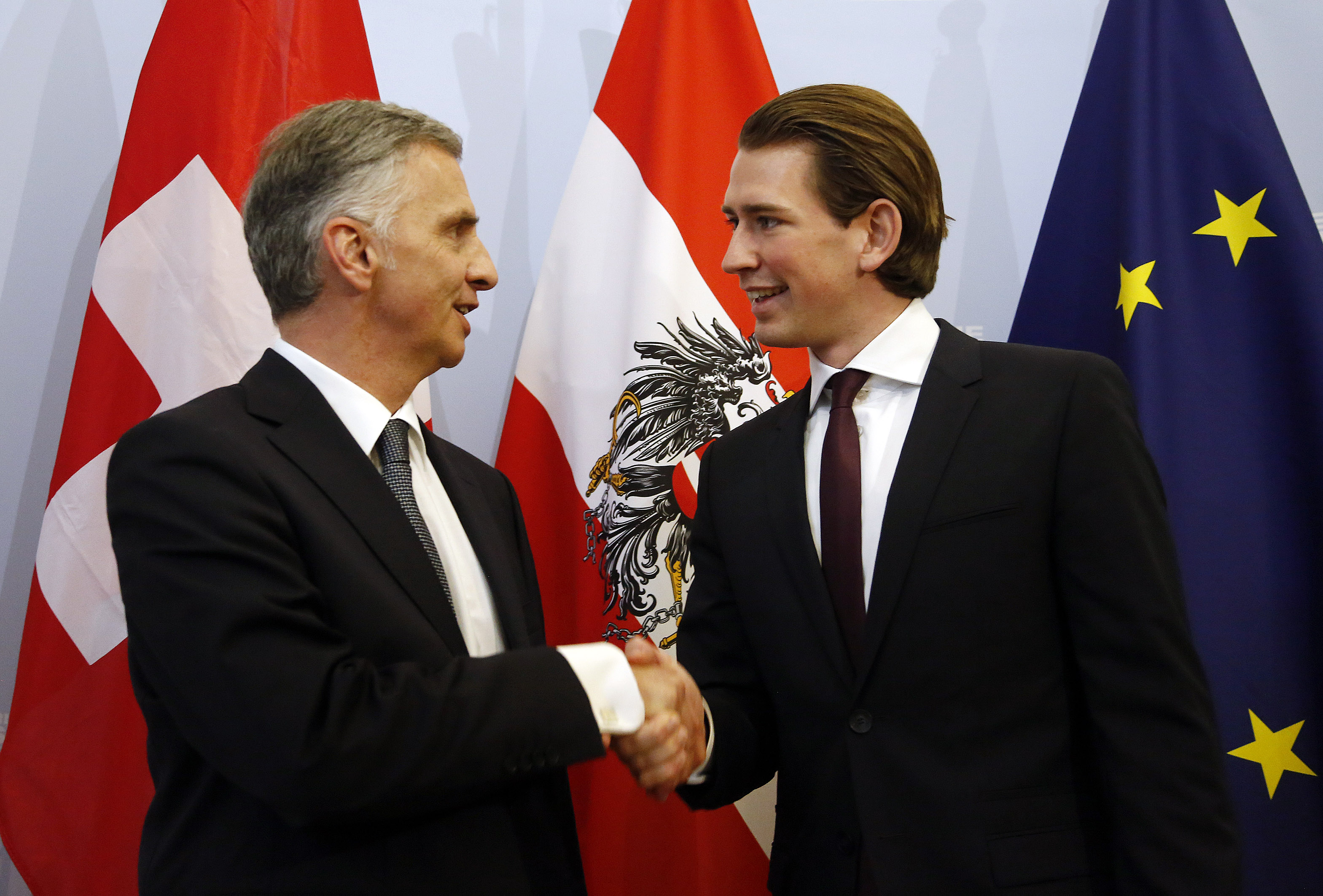 Außenminister Sebastian Kurz trifft den Bundespräsidenten der Schweizerischen Eidgenossenschaft, Didier Burkhalter. Wien, 17.01.2014, Foto: Dragan Tatic